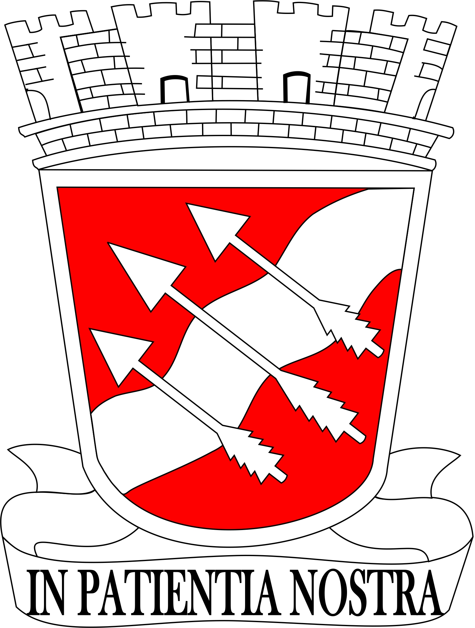 Brasão de São Sebastião do Passé